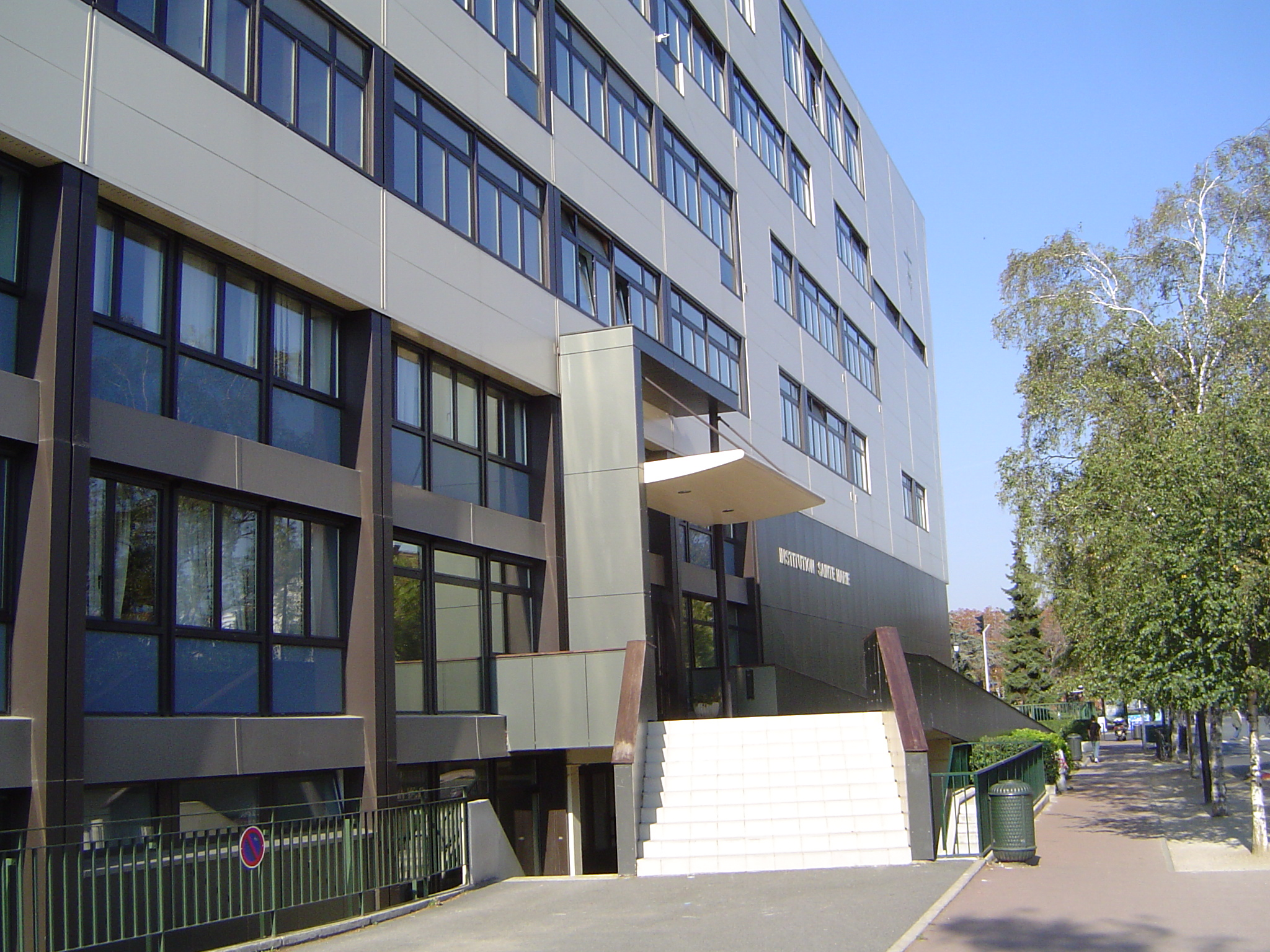 Photo prise à Antony (France)